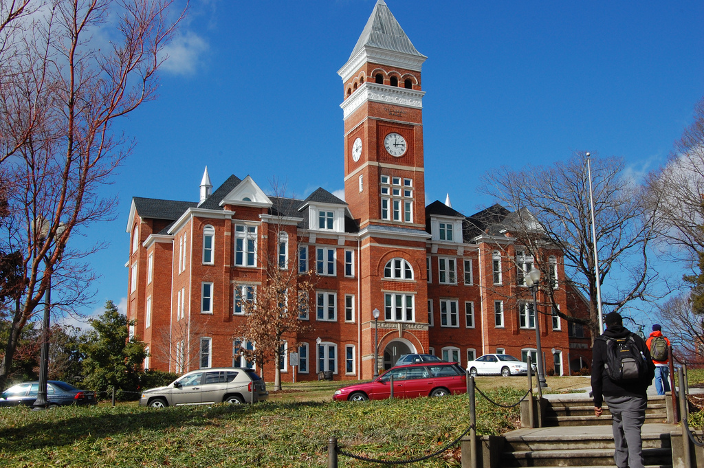 Tilman Hall